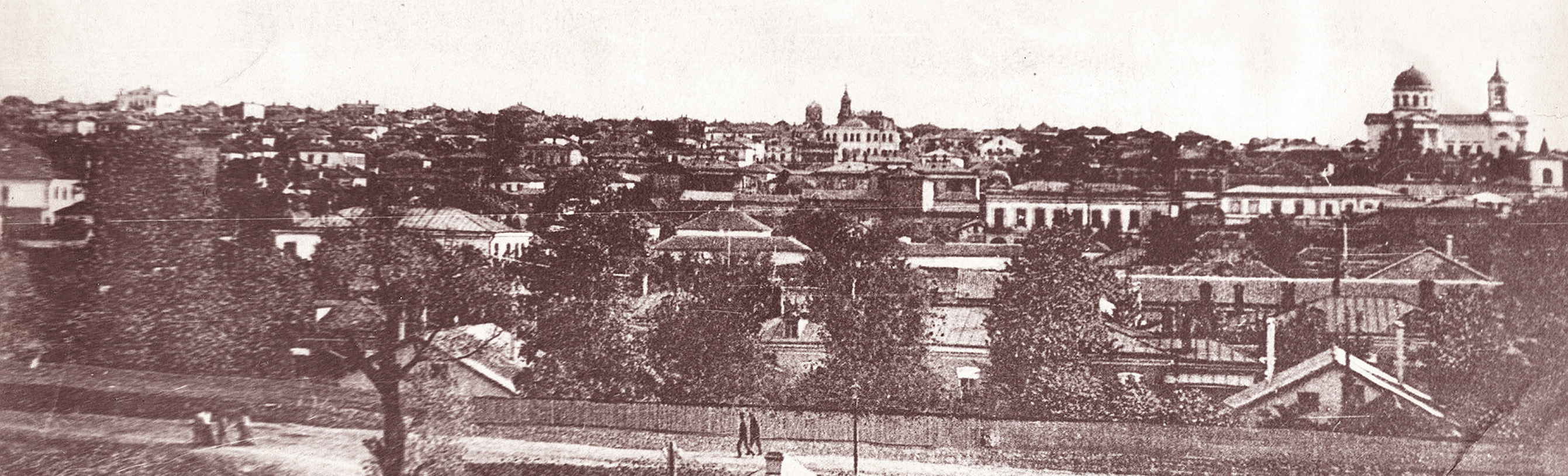 Панорама Старого міста. Праворуч - Миколаївський собор, перед ним Успенська молитовня, у центрі - Воскресенська церква.